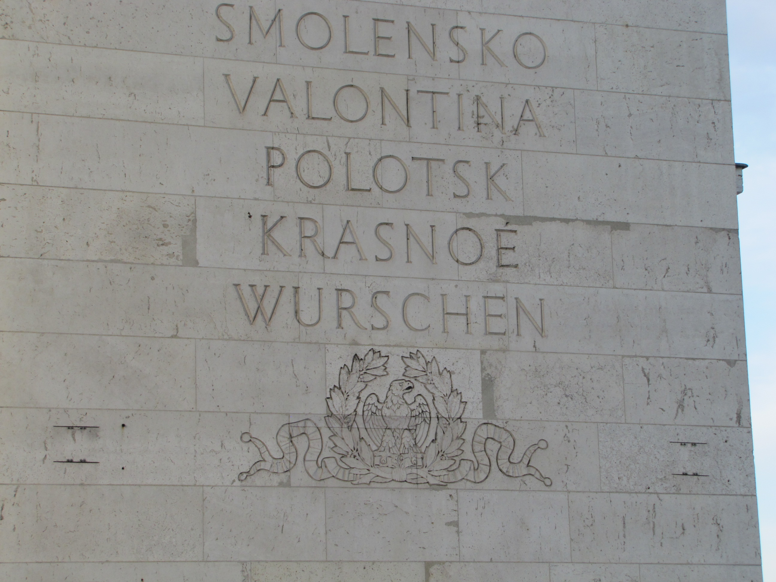 Die in Deutschland bekannte "Schlacht bei Bautzen" wurde durch die französischen Geschichtsschreiber am Pariser Triumphbogen nach dem Ort Wurschen benannt.